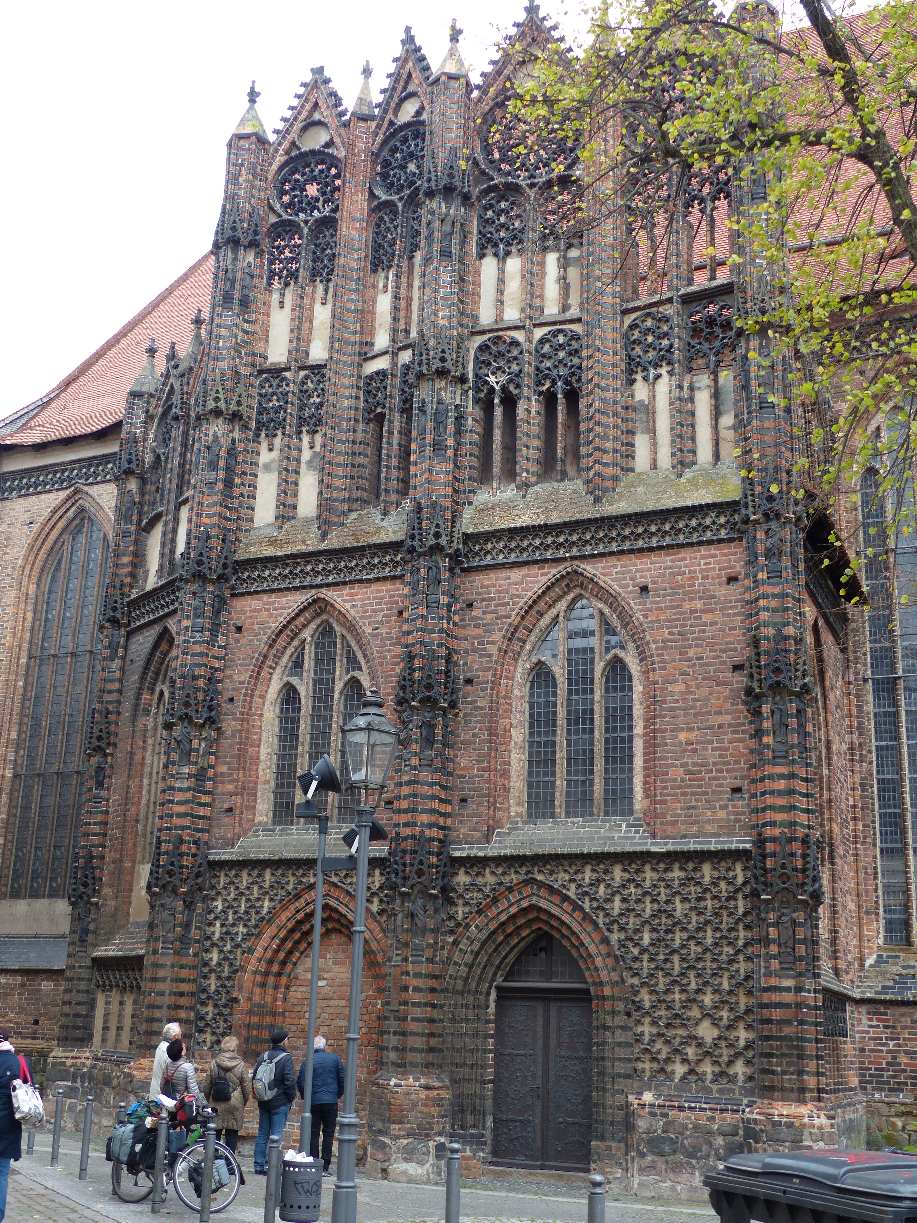 Nordkapelle der Katharinenkirche in Brandenburg (Havel)